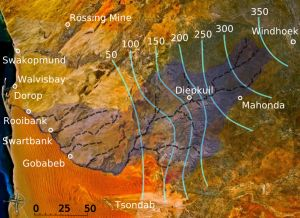 Kuiseb, Namibia: Einzugsgebiet und durchschnittlicher jährlicher Niederschlag in mm